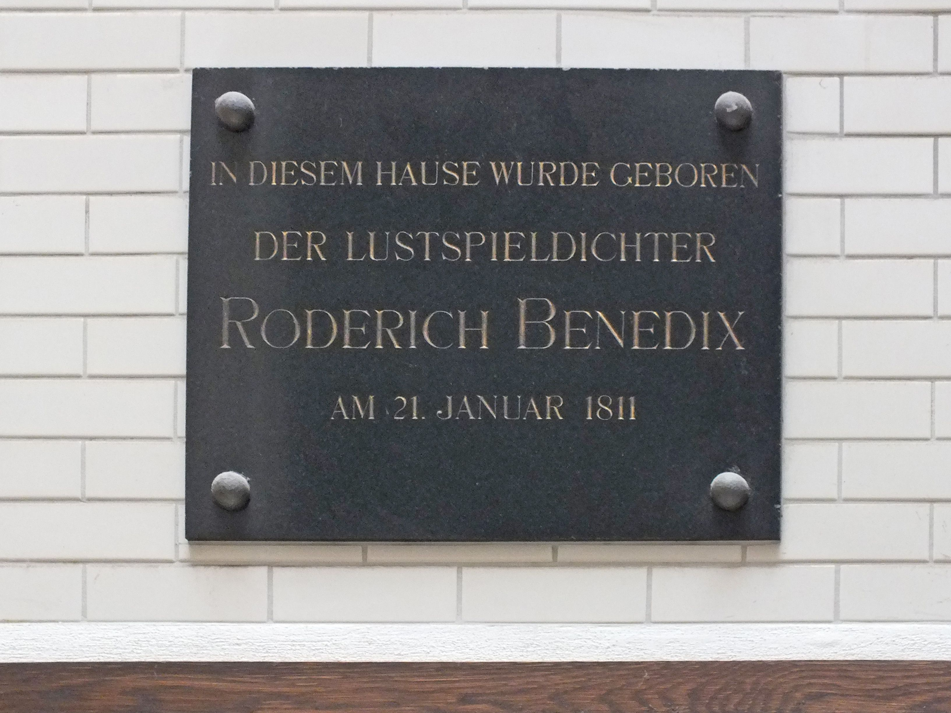 Specks Hof, Leipzig. Erinnerungstafel an den Lustspieldichter Roderich Benedix, der in einem Vorgängerbau von Specks Hof geboren wurde.